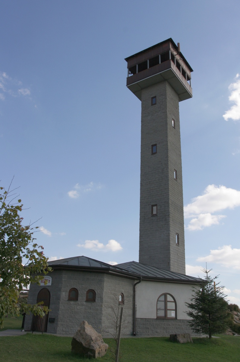 Rozhledna u Karasína